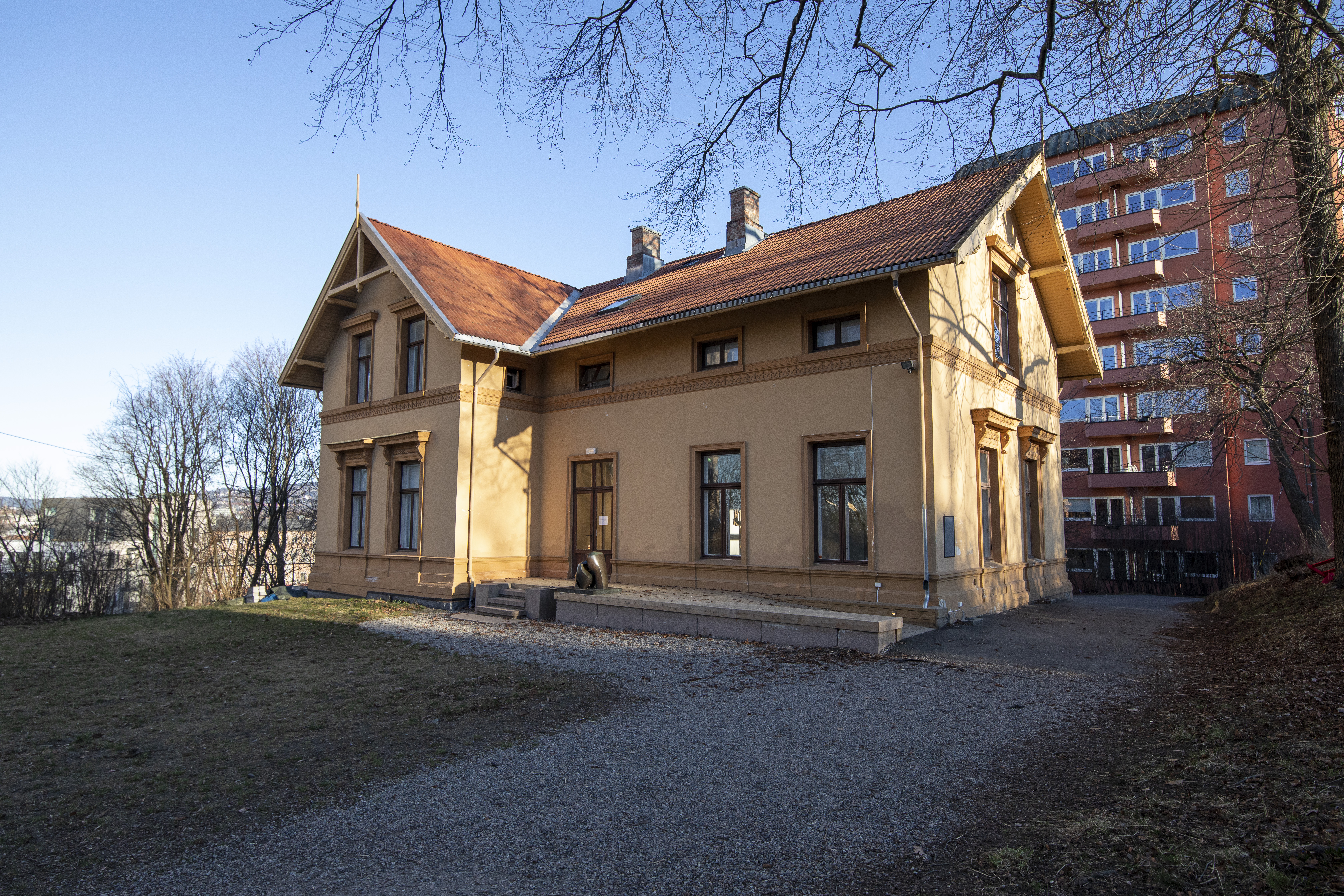 Villa Furulund, nasjonalt senter for tredimensjonal kunst, drevet av Norsk Billedhoggerforening.